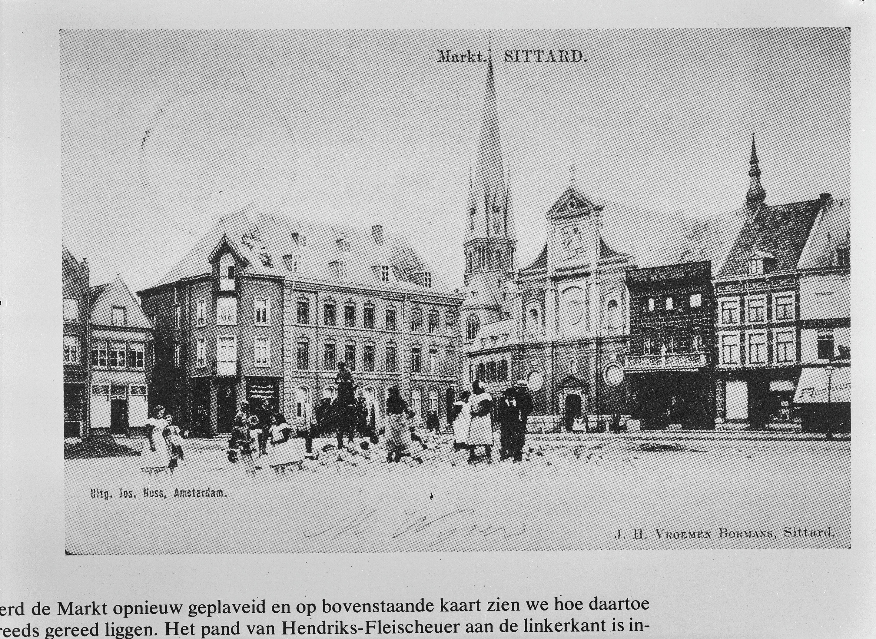 overzicht reproductie uit Sittard in oude ansichten door J.L.Offermans blz.41 This is an image of rijksmonument number 33700